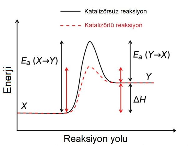 X → Y veya Y → X reaksiyonlarını başlatmak için Ea (X → Y) veya Ea (Y → X) aktivasyon enerjilerinin sağlanması gerekir. Katalizör eklendiğinde, aktivasyon enerjisi azalır. Ancak X ve Y arasındaki entalpi değişikliği ΔH (termodinamik faktör) sabit kalır.